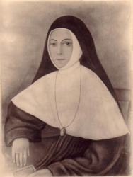 Elise Cestac religieuse